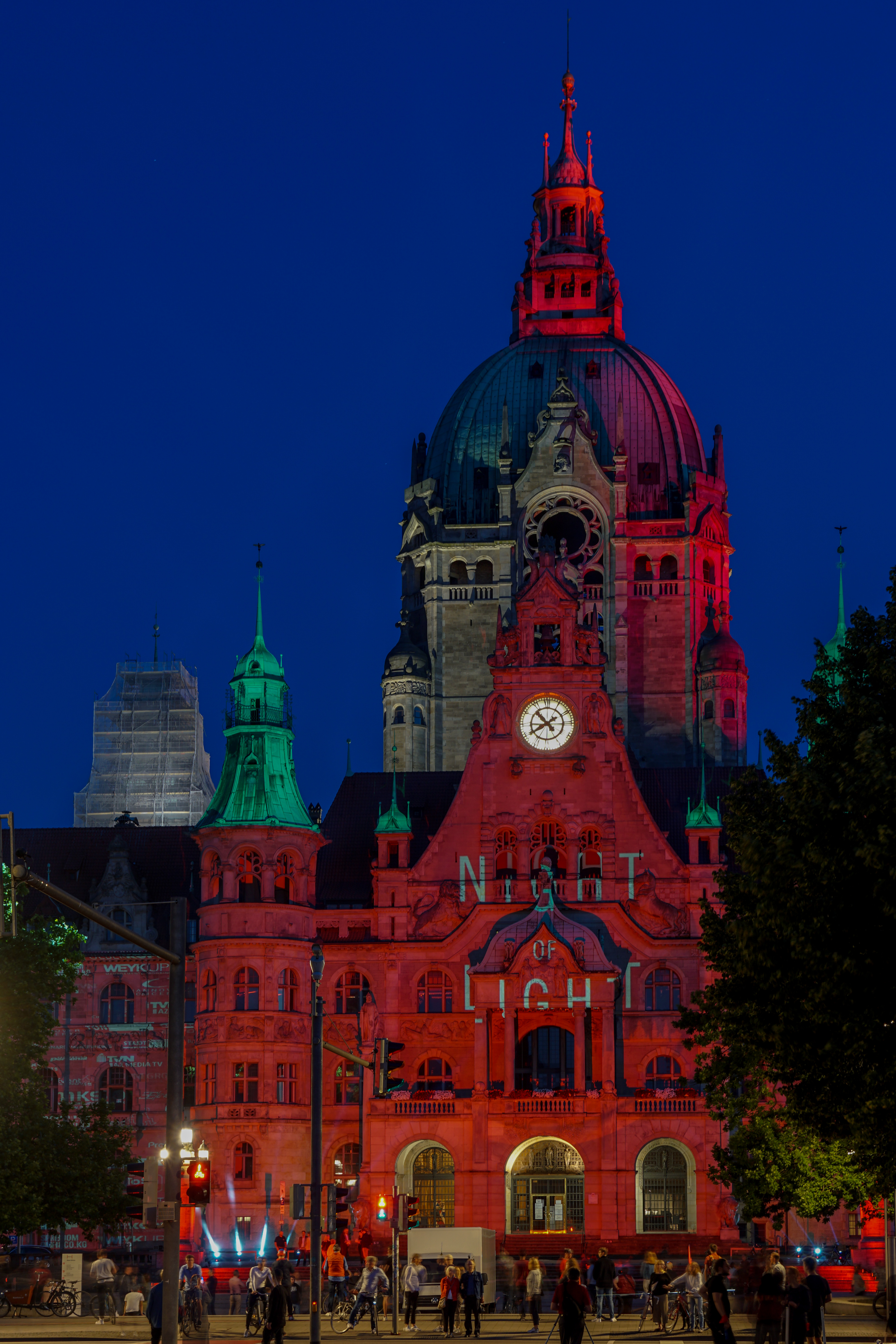 Neues Rathaus in Hannover, angestrahlt im Rahmen der Aktion Night of Light der Veranstaltungsbranche